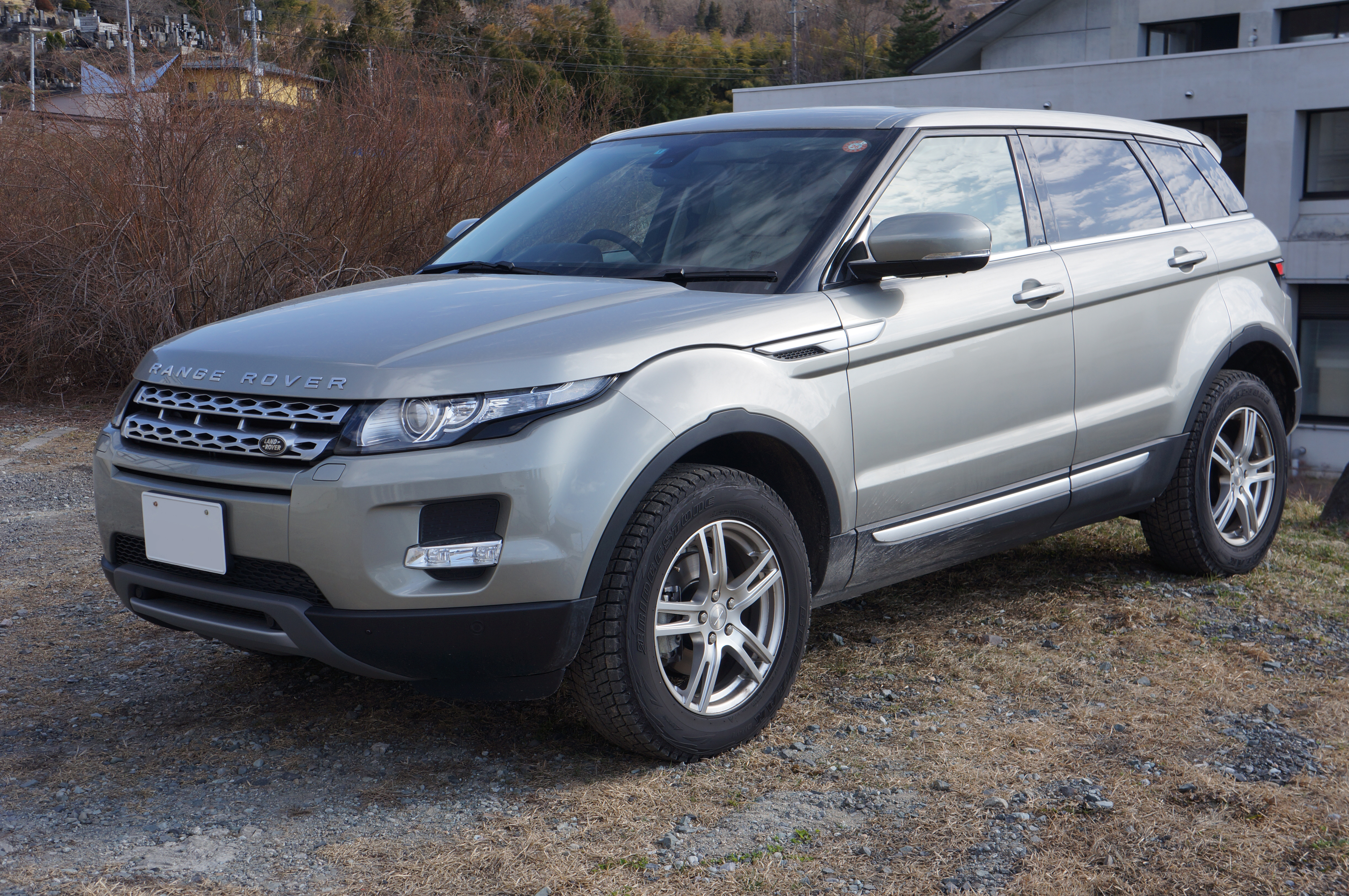 Range Rover Evoque Japan